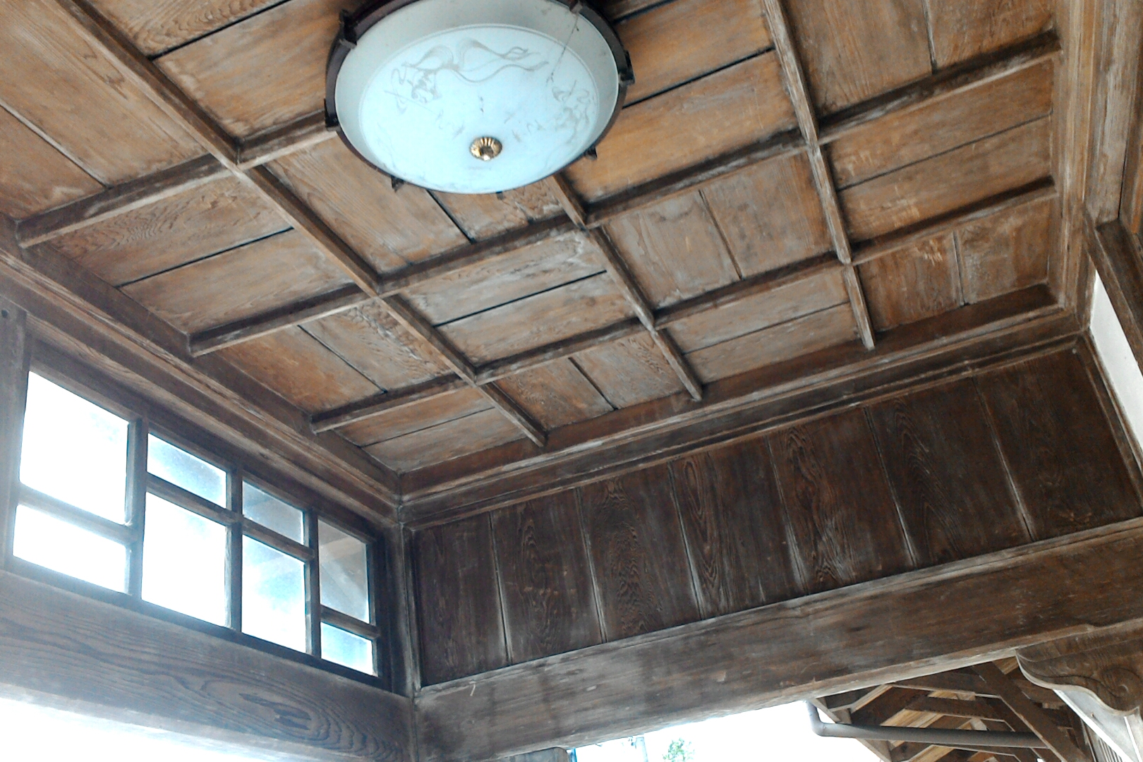 台鐵香山車站玄關天花板,台灣省新竹市香山區香山聯里朝山里